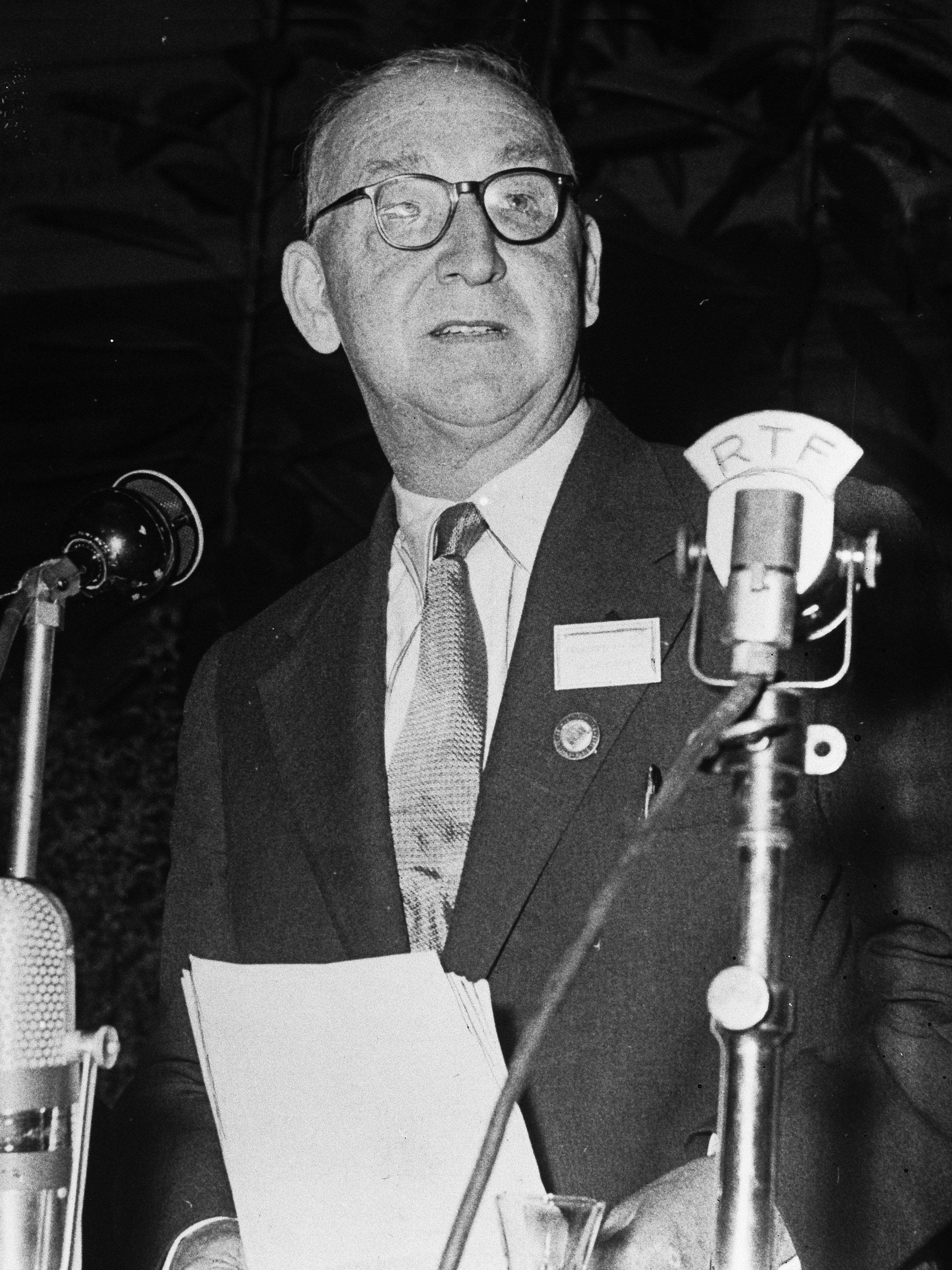 Engelse natuurkundige Sir John Cockrott krijgt "Atomen voor de vrede" prijs